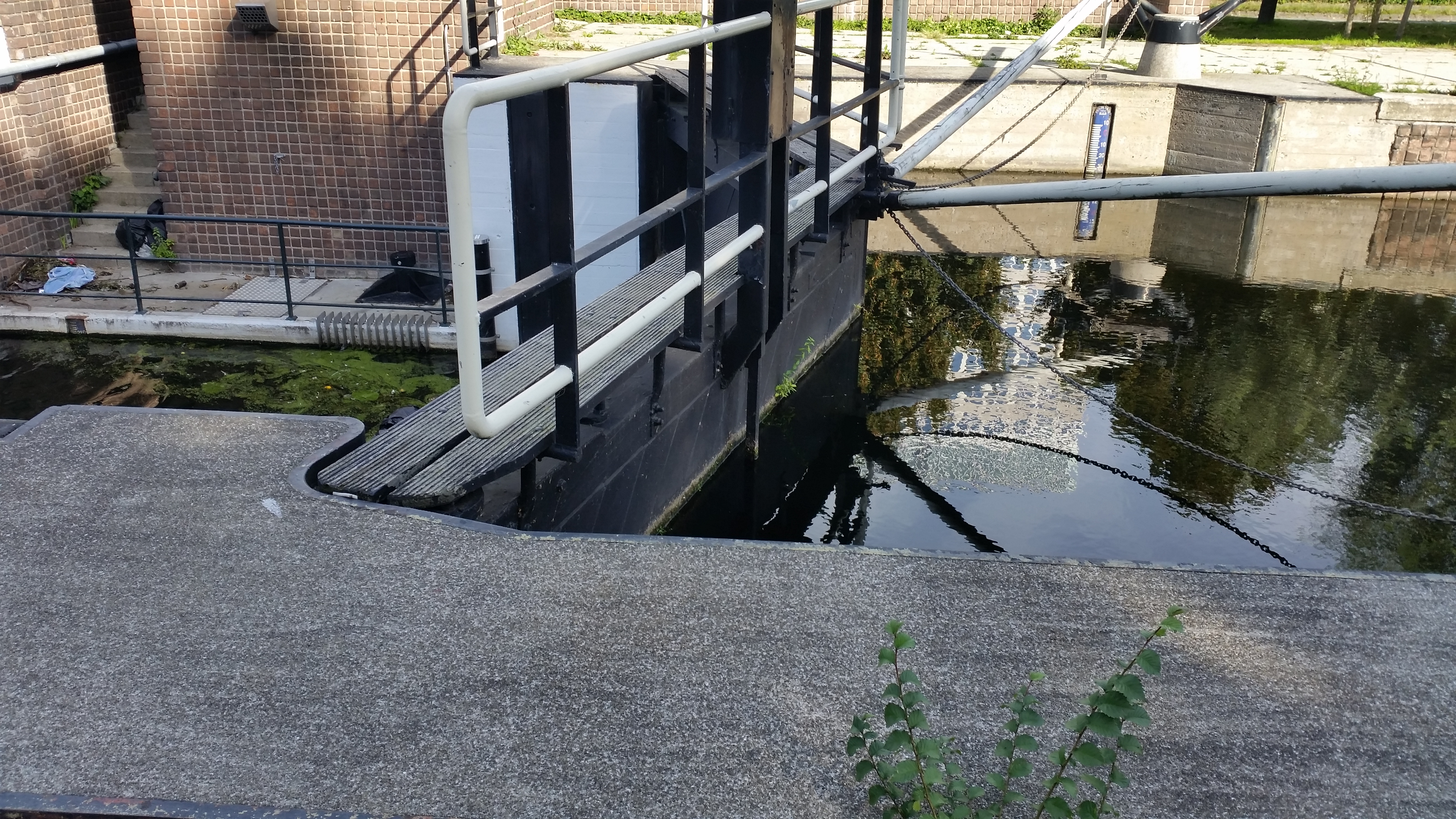 Verschil in waterpeil aan de zijde van de Slotervaart in de Westlandgrachtschutsluis